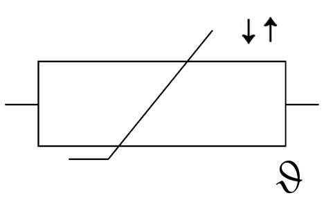 Beschreibung: Schaltzeichen eines NTC-Widerstandes Autor: Dorfjung Datum: 13. Juli 2006 Lizenz: GFDL